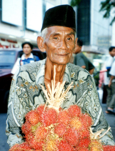 Javanese Man selling Rambutan in Semarang, Indonesia. Photo by User:Merbabu 1997.Merbabu 13:49, 10 October 2006 (UTC)